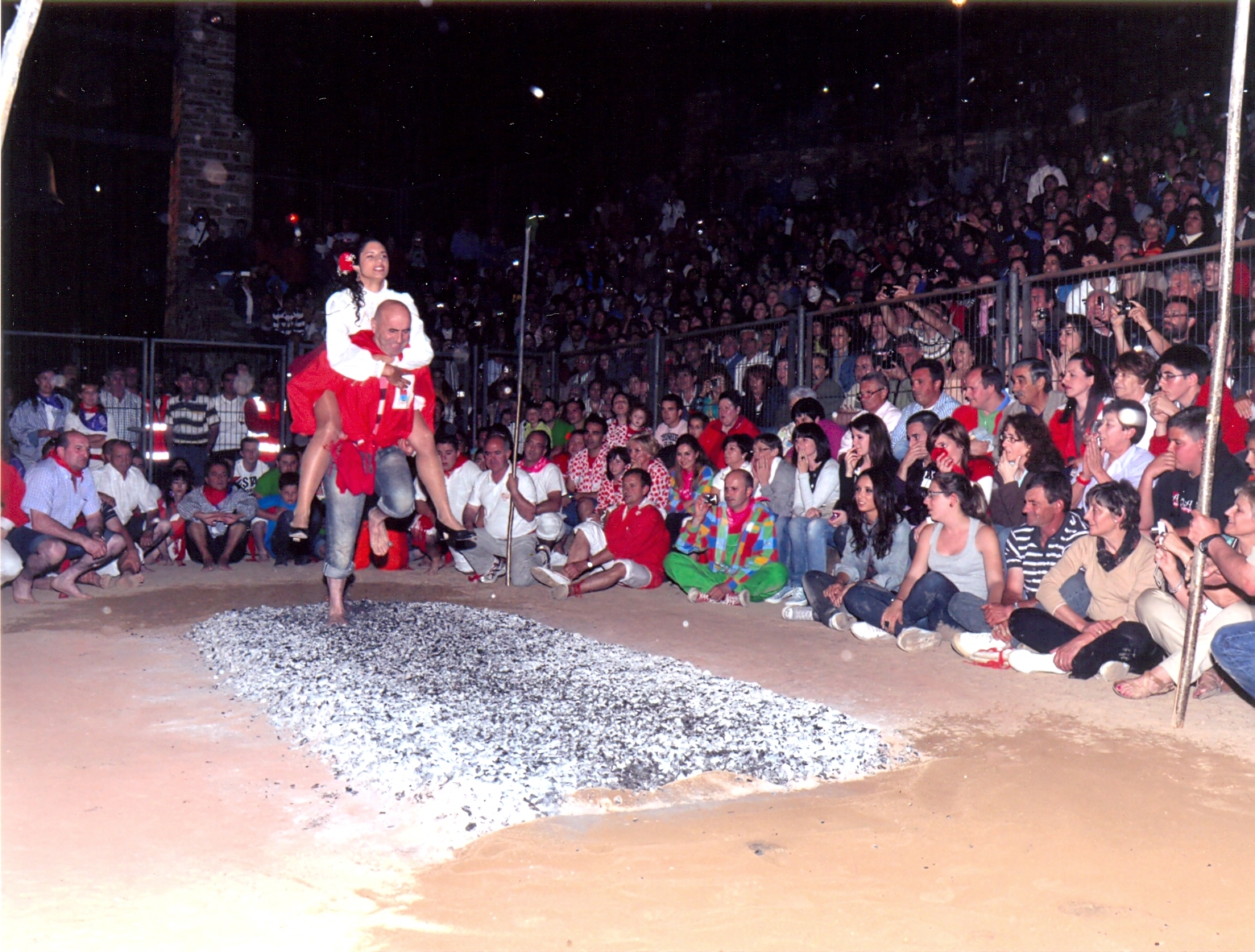 PASO DEL FUEGO 23-06-2011